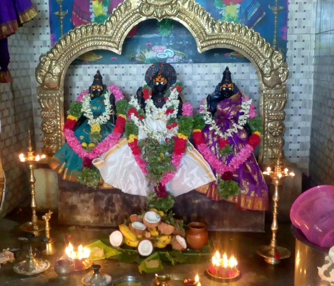 our family god ayyanar very power ful to help people